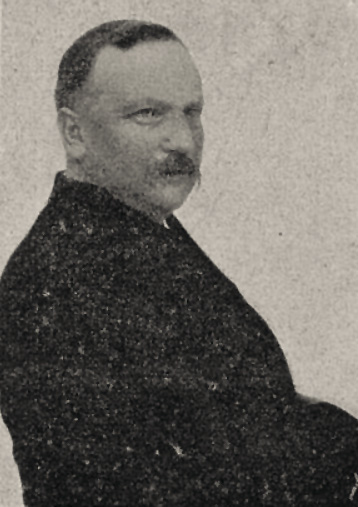 Geh. Medizinalrat Prof. Dr. Oskar Witzel, Direktor der allg. städt. Krankenanstalten, 1907